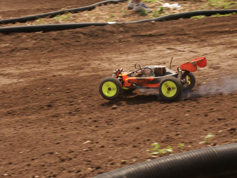 באגי במירוץ אנדורנס